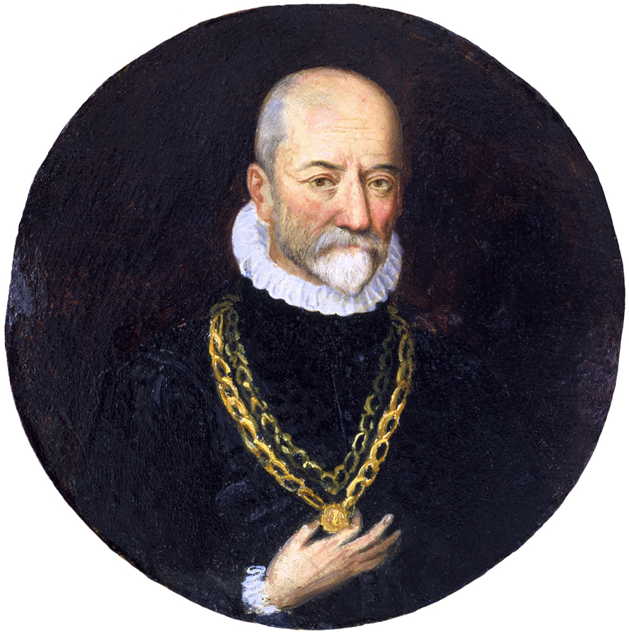 Montaigne, portrait anonyme, vers 1590.